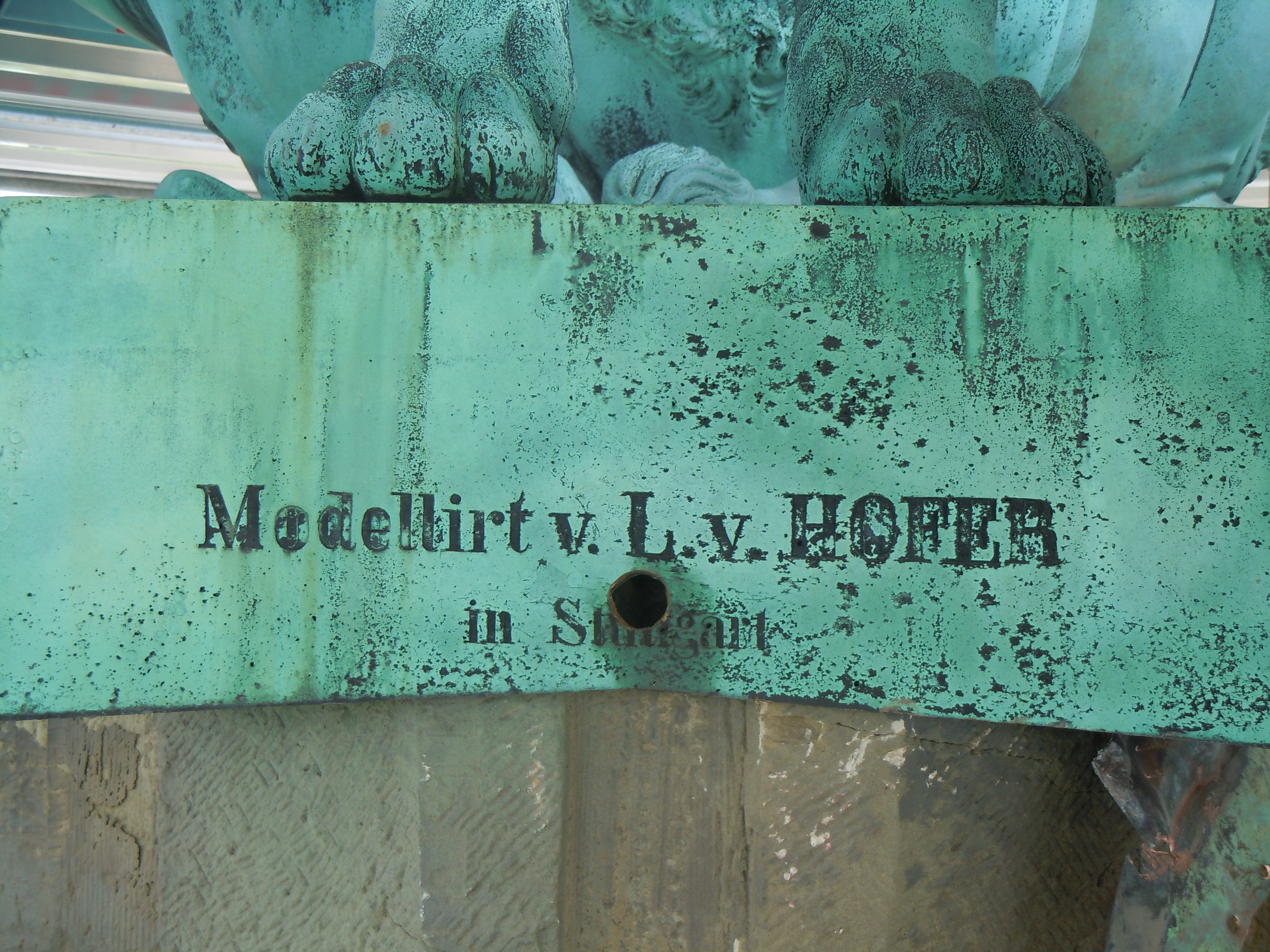 Jubiläumssäule auf dem Schlossplatz in Stuttgart, Signatur „Modellirt v. L. v. Hofer in Stuttgart“ auf dem Sockel der vier Löwen mit der Kugel, die die Concordia trägt.